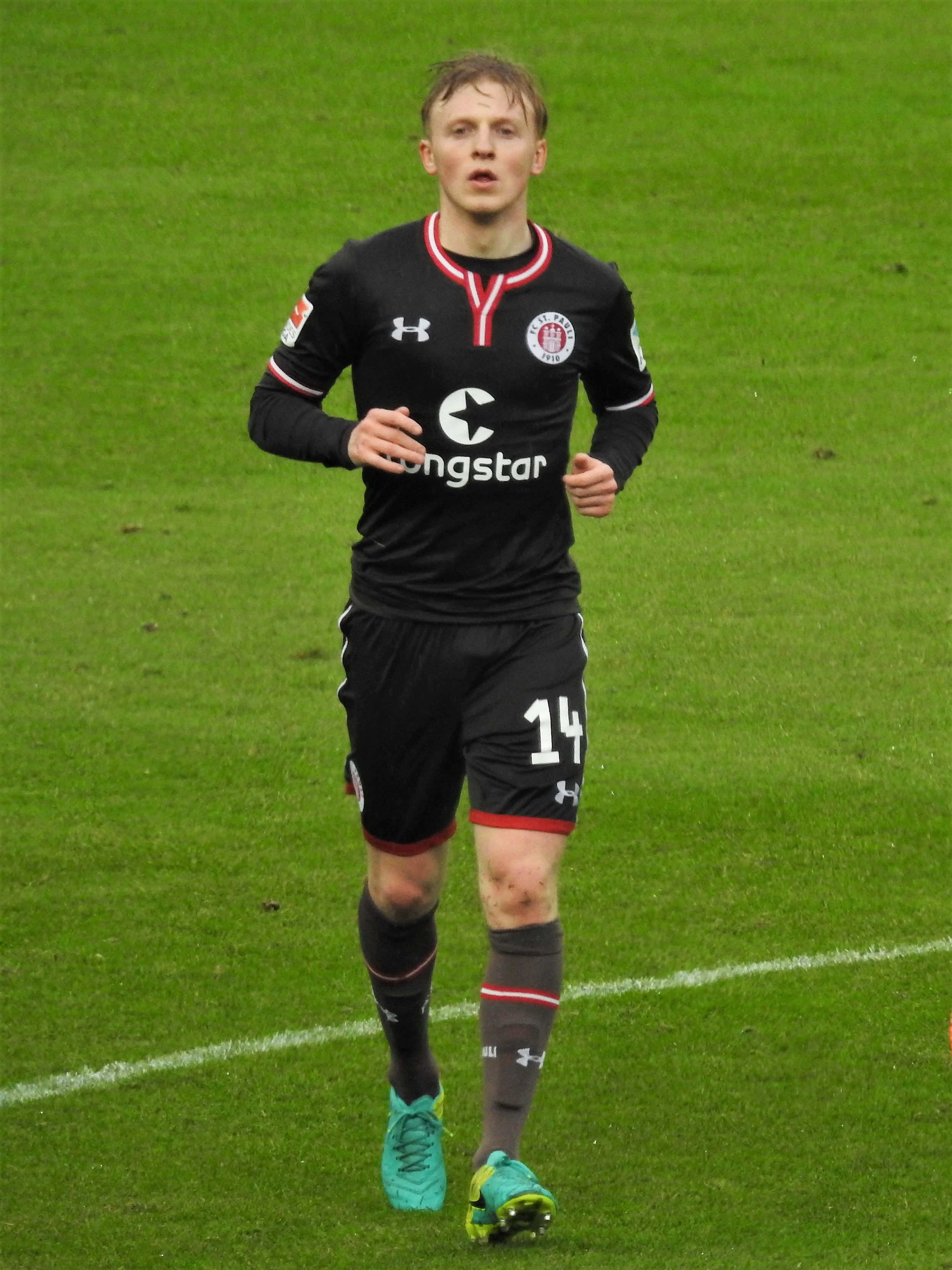 Mats Möller Daehli im Trikot des FC St.Pauli